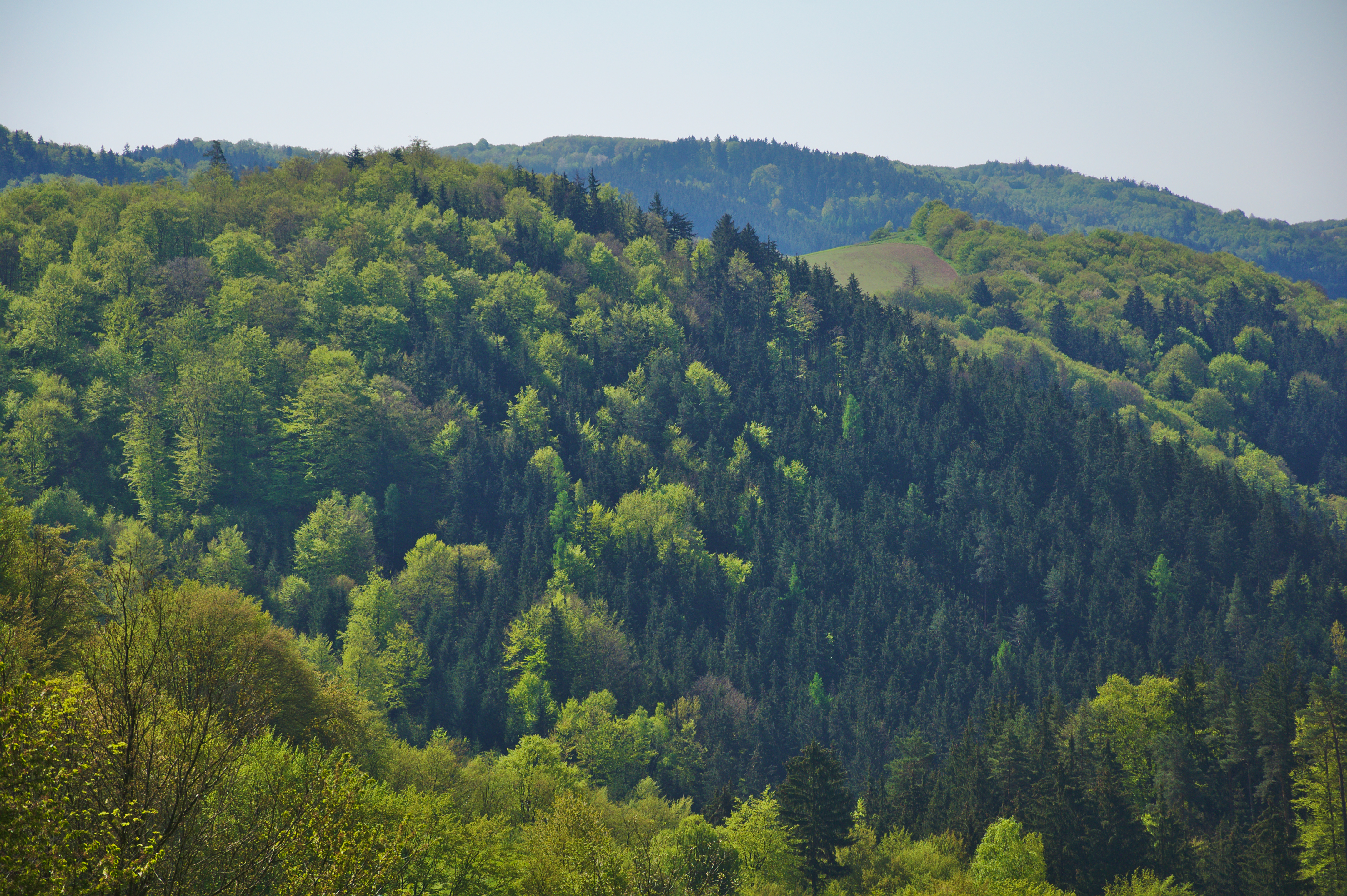 Přírodní rezervace Ochoza z Kopicova vrchu, okres Žďár nad Sázavou